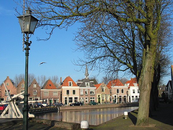 De Westkolk in Spaarndam. Foto van Gerard Hogervorst, 16 januari 2005.